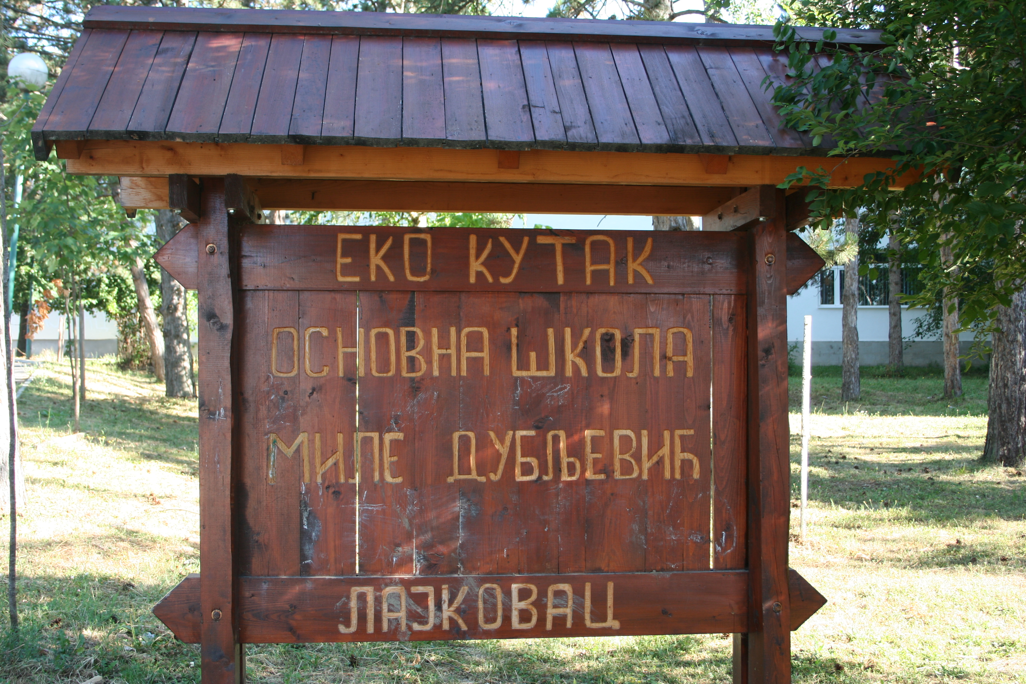 Lajkovac